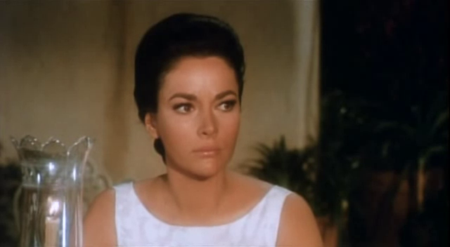 Karin Dor, dans la bande-annonce de Topaz en 1969.